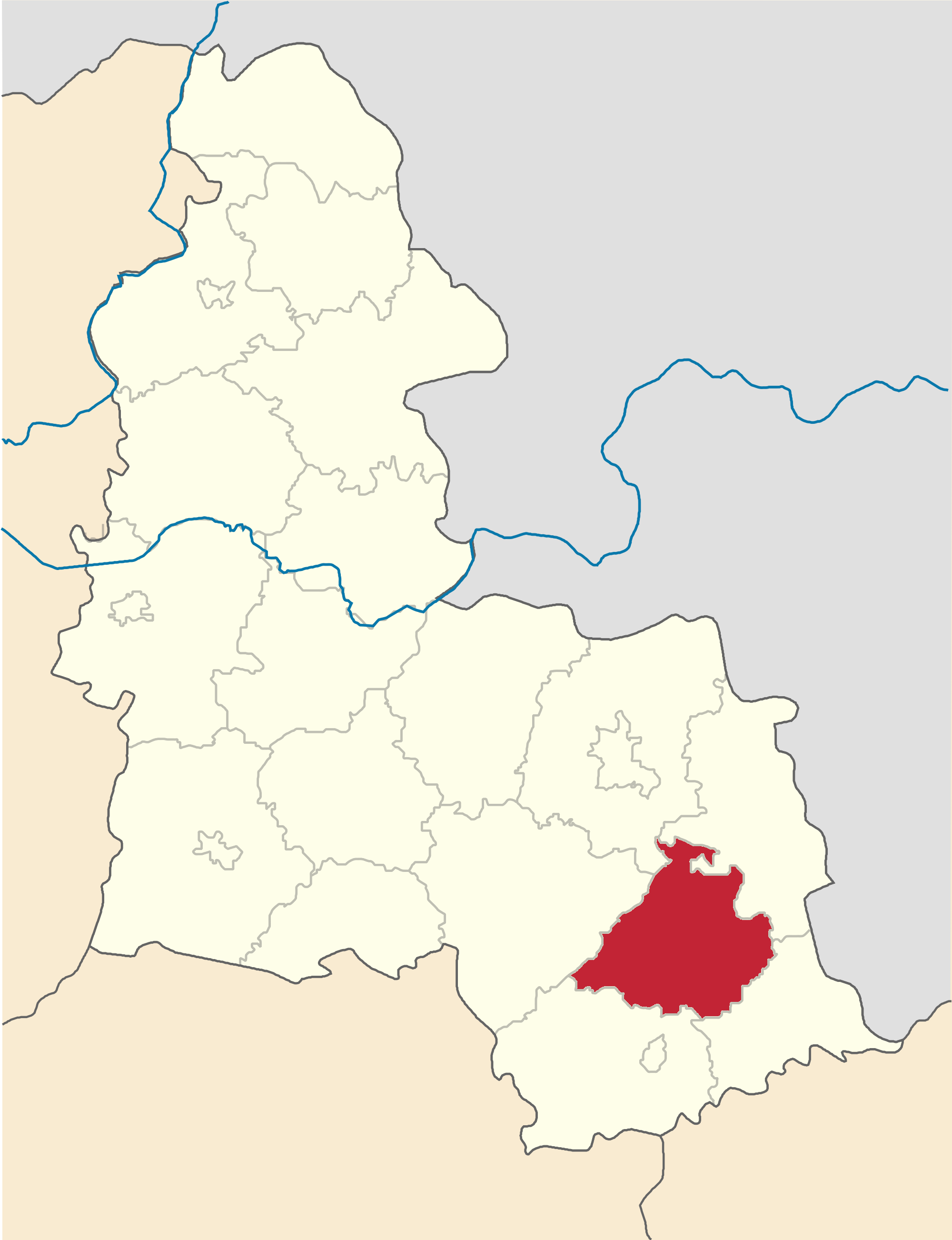 Trostyanetskyi-Raion map